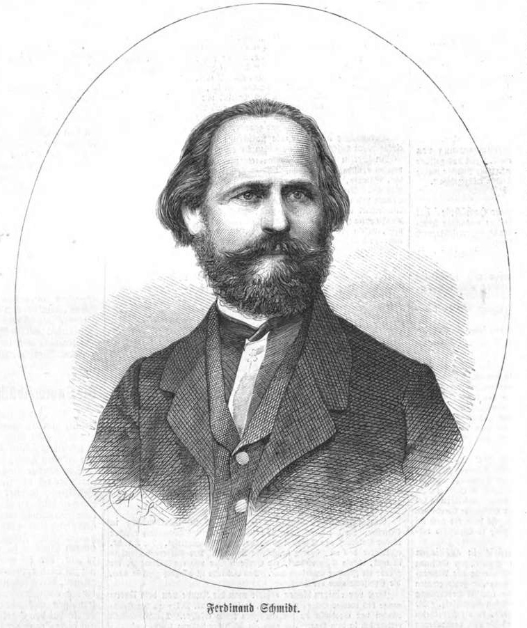 Ferdinand Schmidt, deutscher Lehrer und Schriftsteller im 19. Jh.